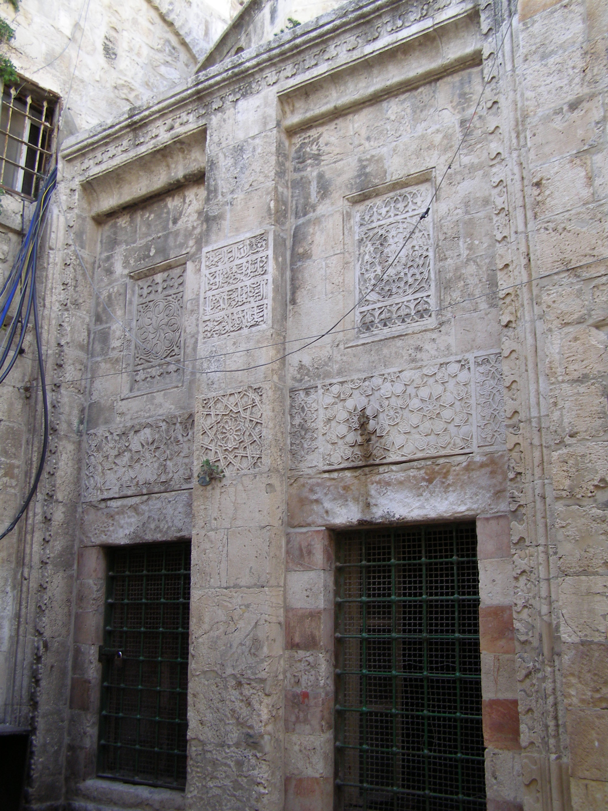 סורגים ממלוכיים, עיטורים ואבלק בתורבת טורקן חתון רישיון נוצר על ידי משתמש:Ranbar